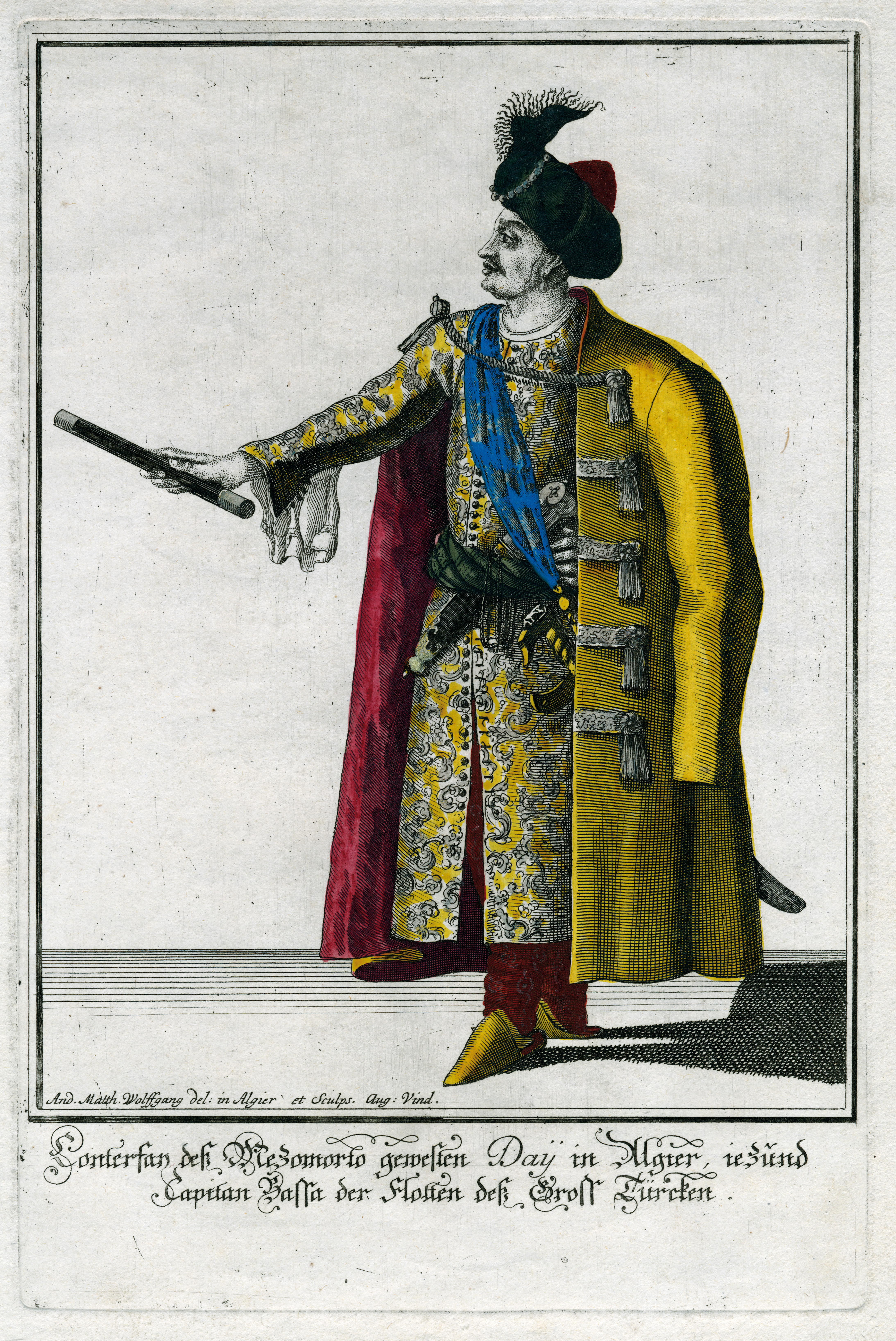 Gravure